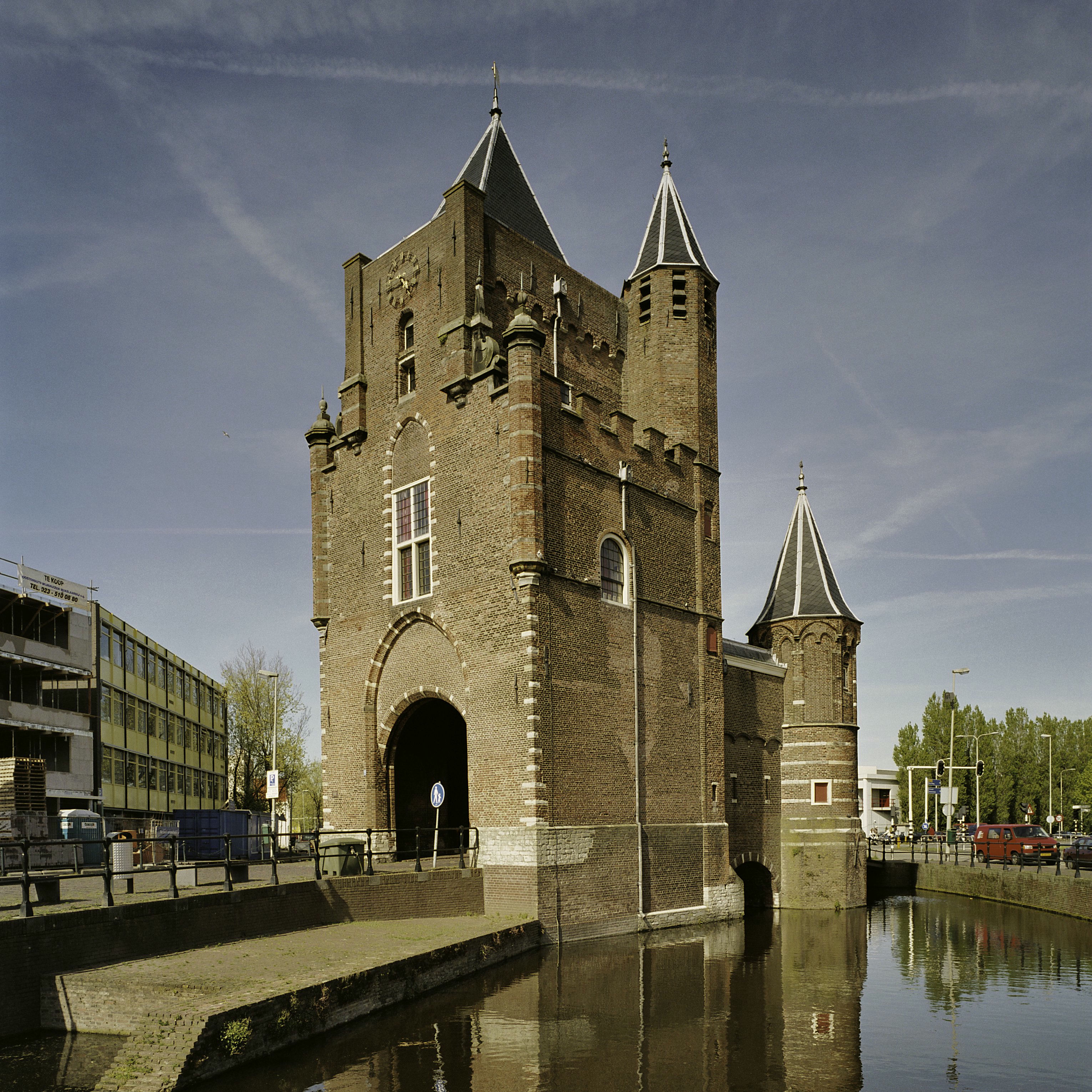 Spaarnwouderpoort of Amsterdamsepoort: Overzicht stadszijde poort gezien vanuit het noorden (opmerking: Gefotografeerd voor Monumenten In Nederland Noord-Holland)